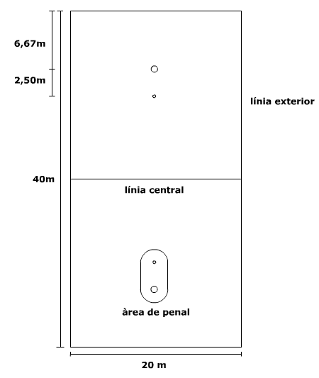 Pista de corfbol i les seves dimensions